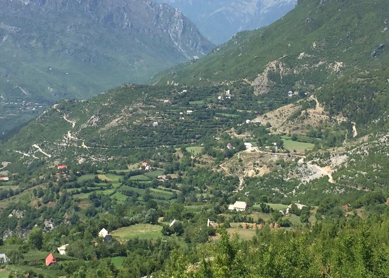 Lagjetː Abat dhe Lekaj